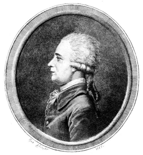 Портрет Дмитра Бортнянського.